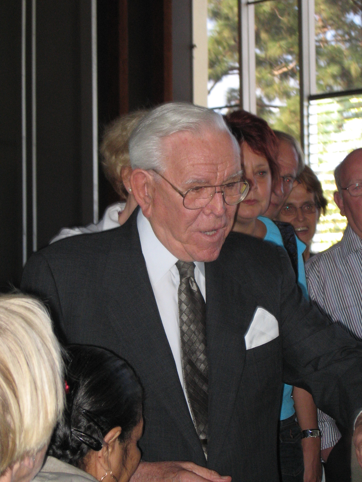 Robert Harold Schuller is een Amerikaanse televisiedominee, stichter en hoofdpredikant van de Crystal Cathedral gemeente, bekend van de internationale televisiekerkdienst Hour of Power.